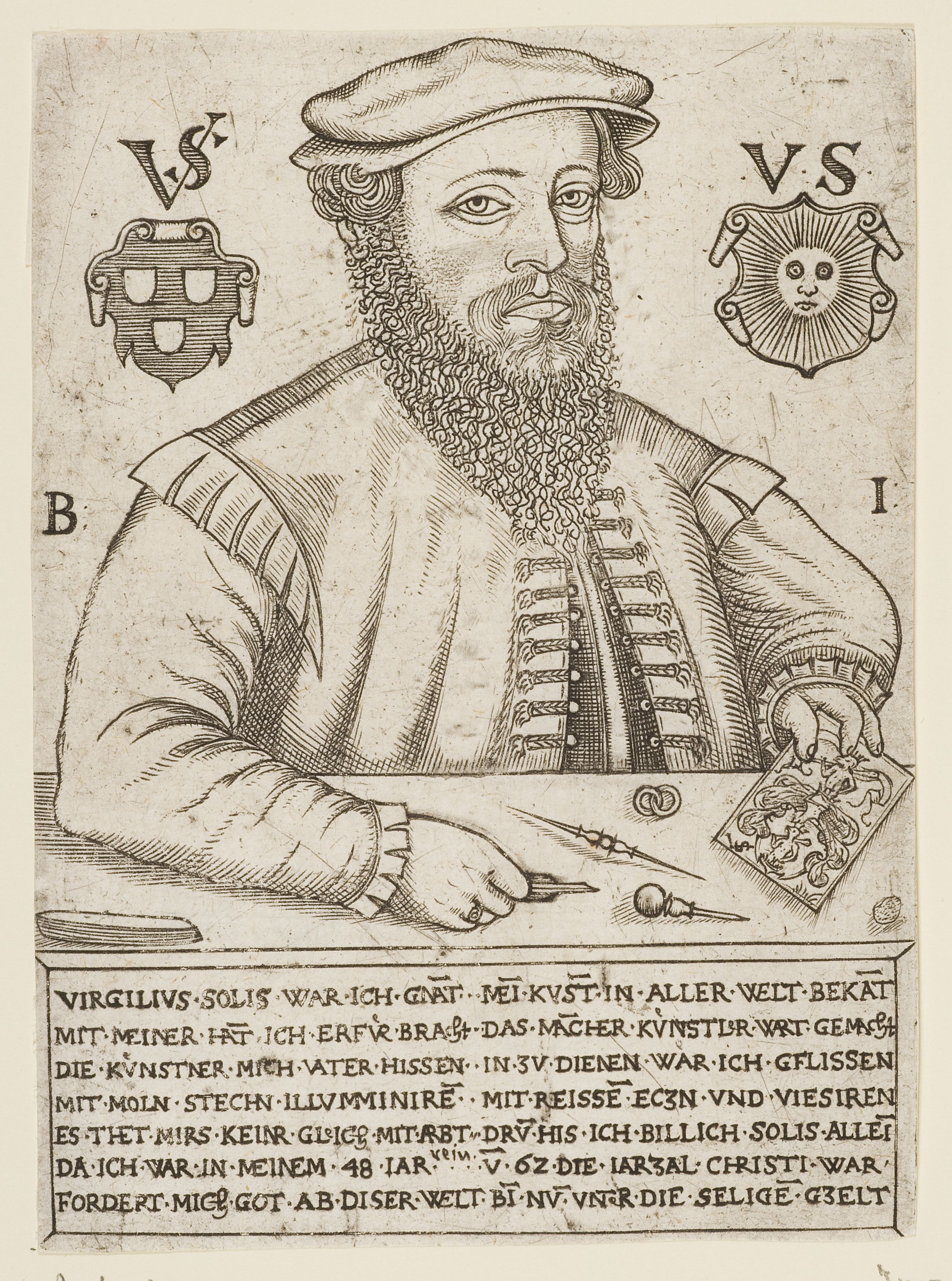 Porträt des Virgil Solis, Kupferstich von Balthasar Jenichen, Text: Virgilius Solis war ich gnant – Mein Kunst in aller Welt bekant Mit meiner Hant ich erfür bracht – Das mancher Künstler wart gemacht Die Künstner mich Vater hissen – In zu dienen war ich gflissen Mit Moln Stechn Illumminiren – Mit Reissen Eczn und Viesiren Es thet mirs keinr gleich mit arbt nein – drum his ich billich Solis allein Da ich war in meinem 48 Jar – Von 62 die Jarzal Christi war Fordert mich Got ab diser Welt – Bin nun unter die Seligen gzelt